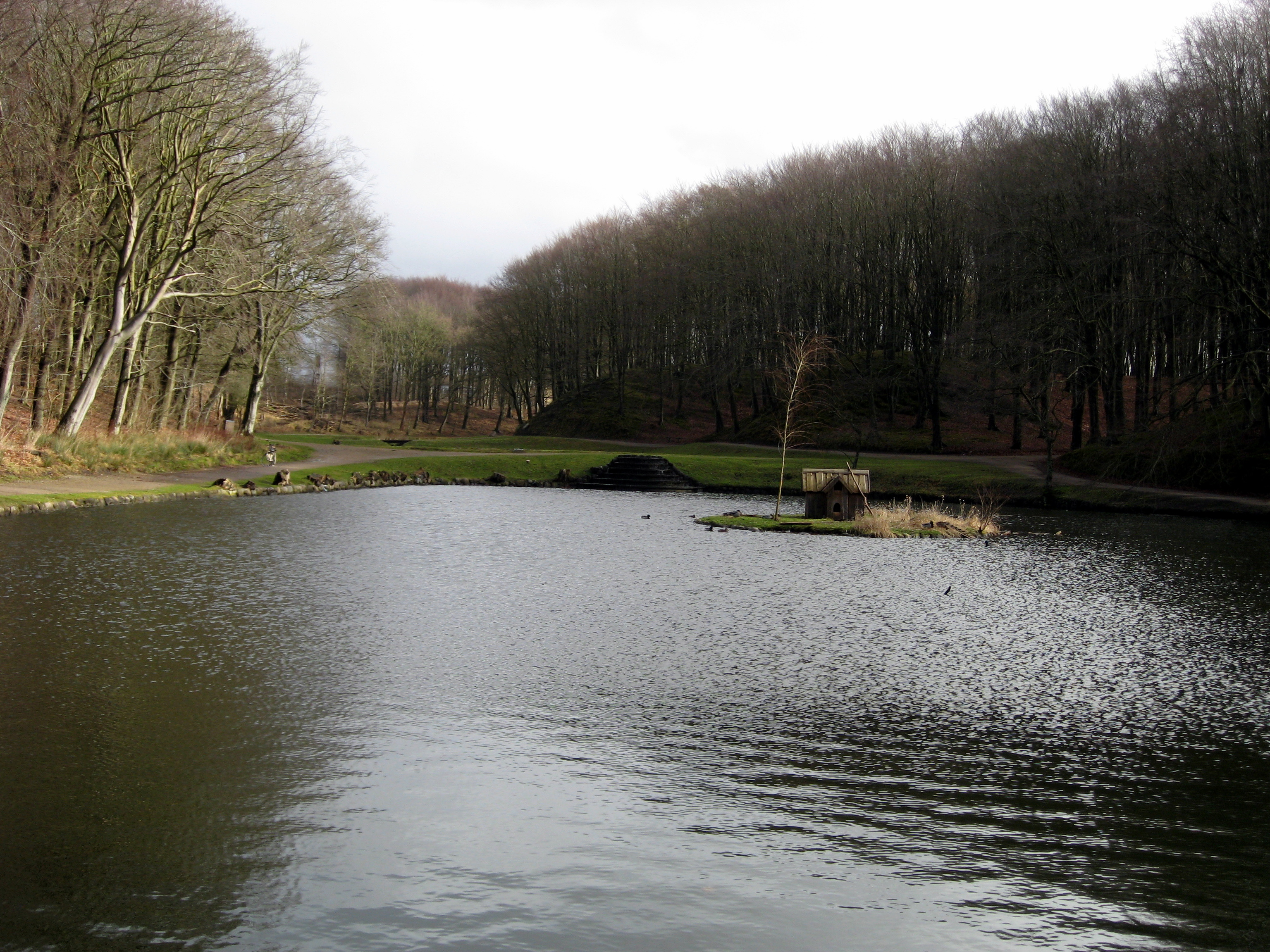 Sct. Knuds Kilde i Hjørring, 2009